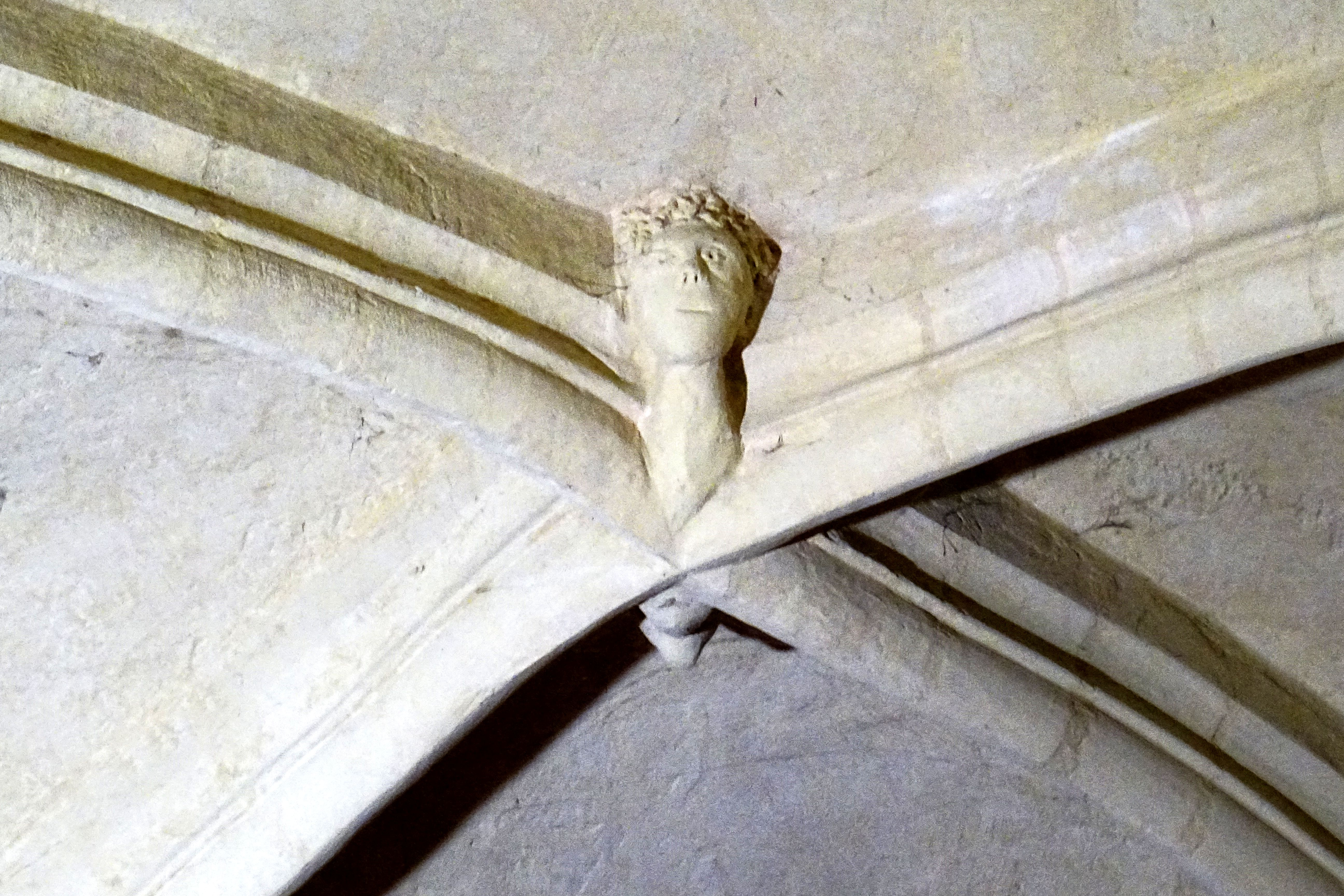 Clé de voûte - voir le titre du fichier.